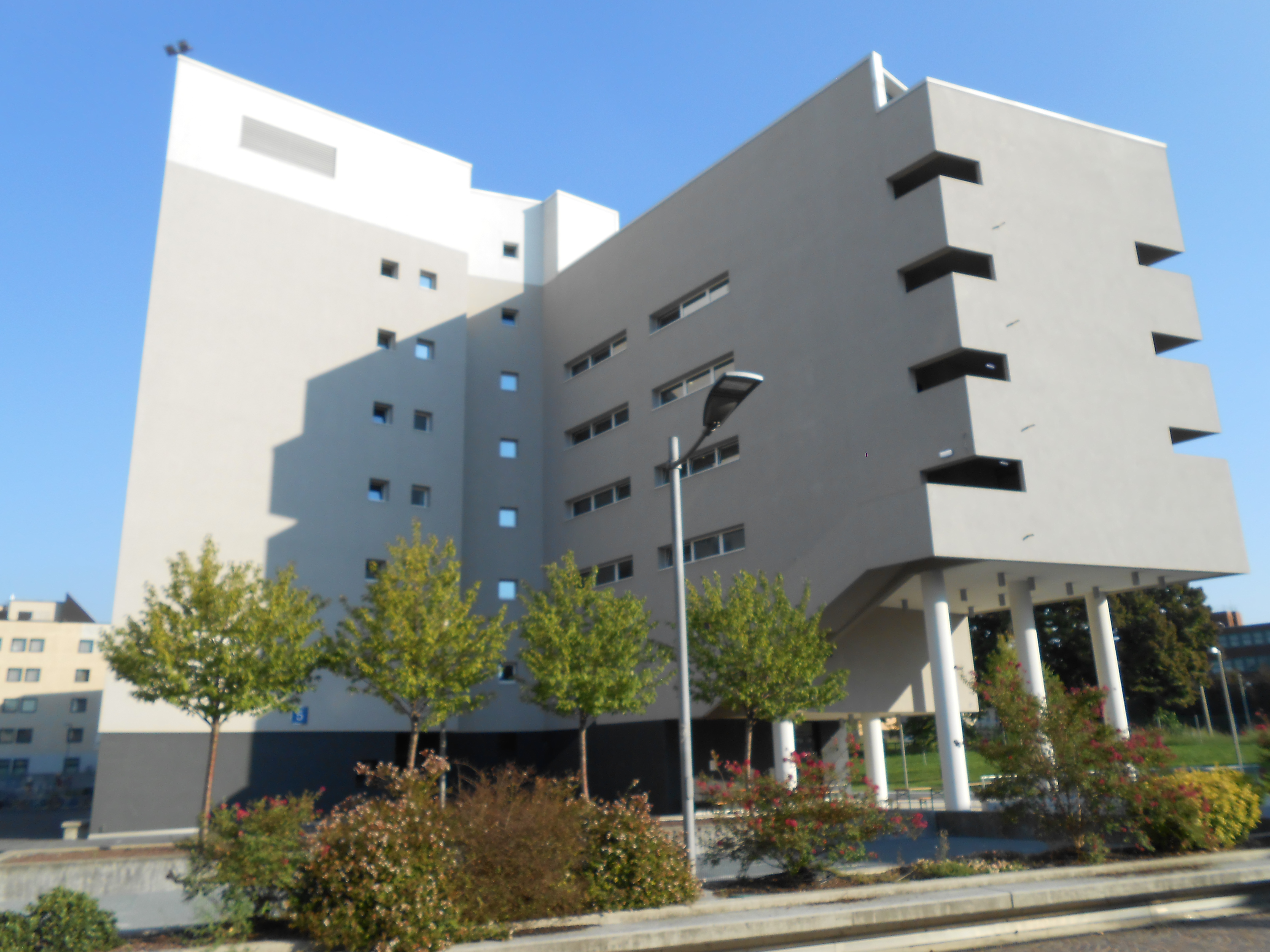 Cittadella dello studente, Psicologia, Gino Valle, Padova